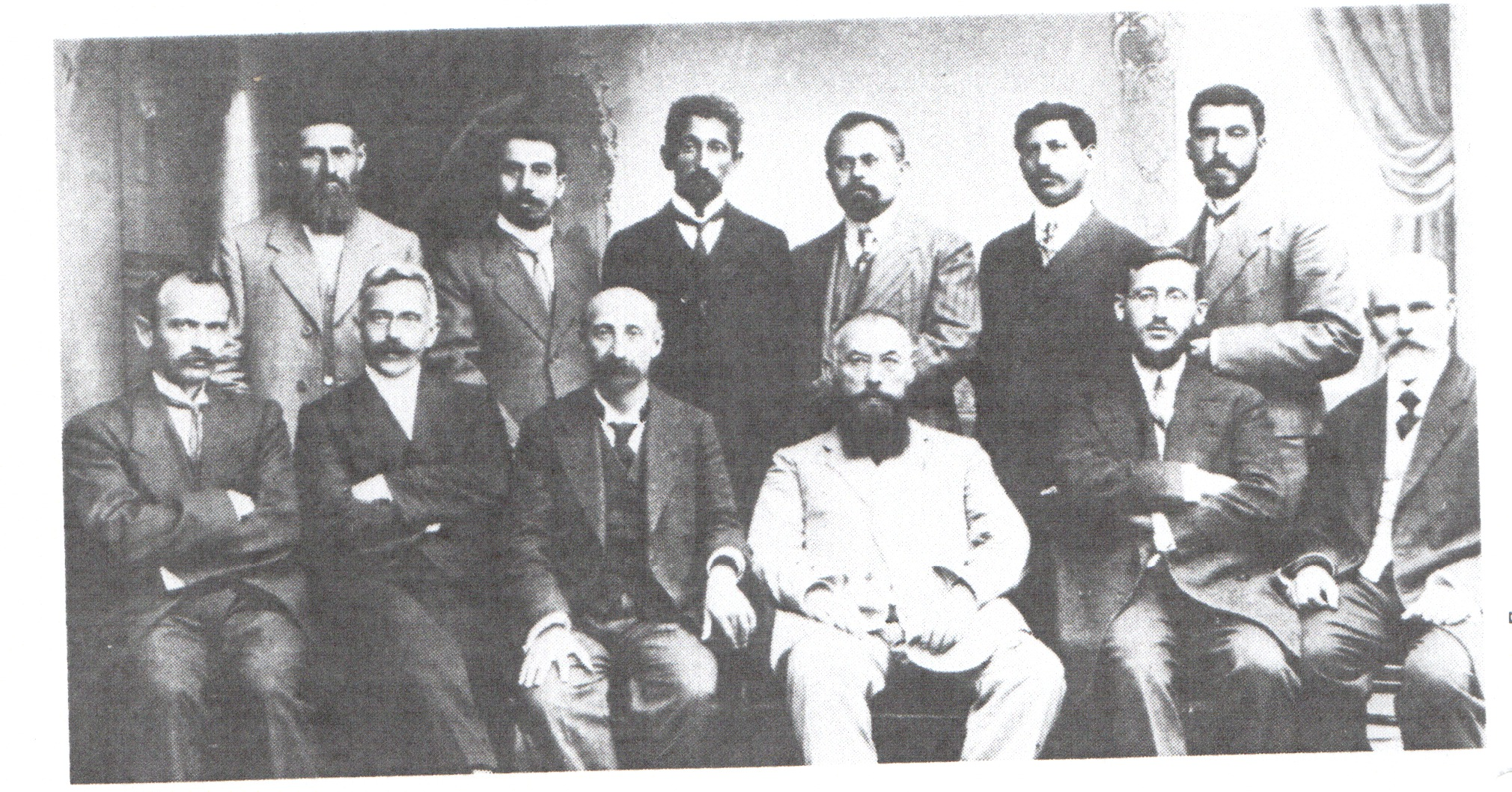 הנהלת אפ"ק שנת 1913